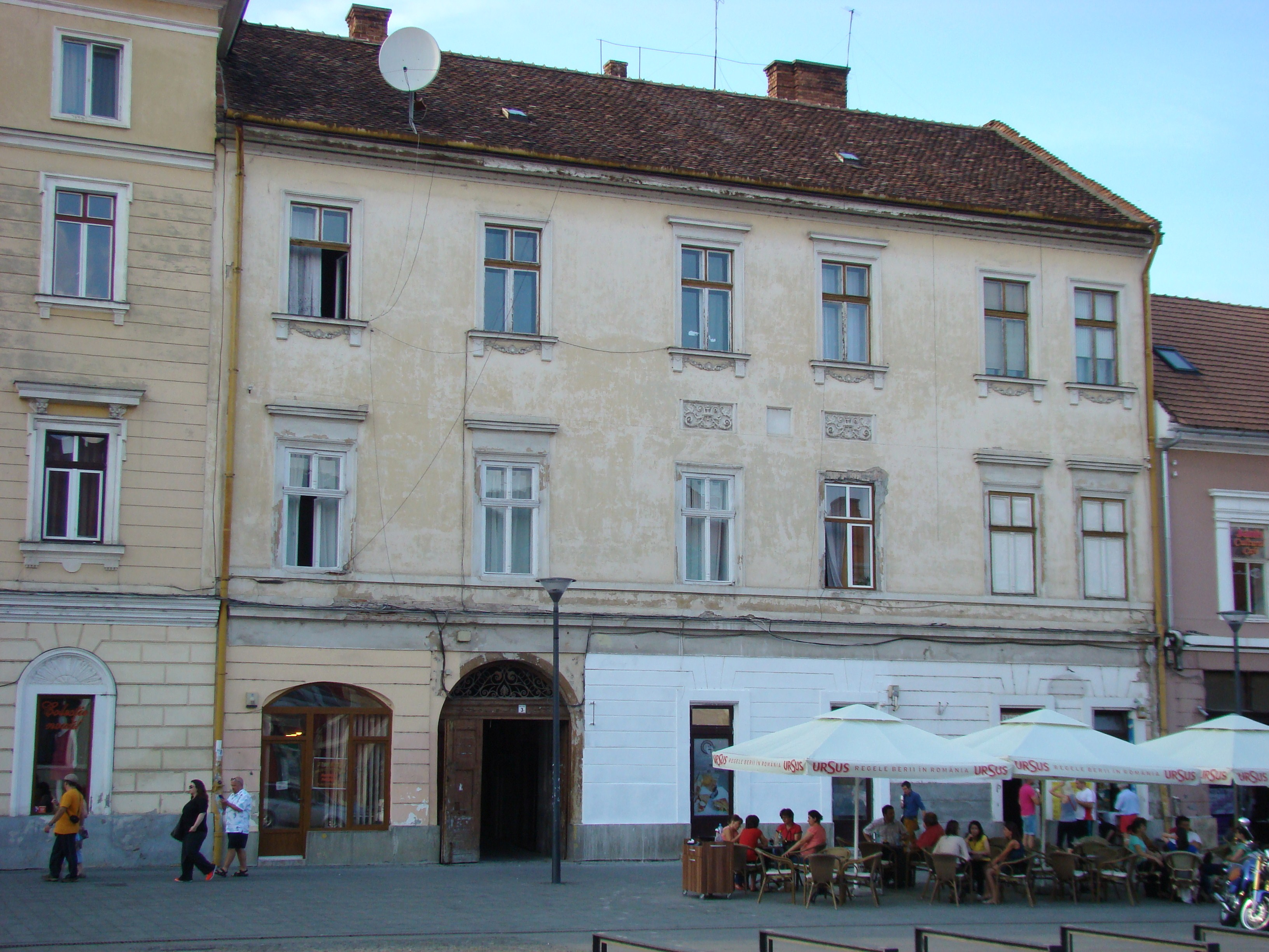 Clădire monument istoric, Bd.Eroilor, nr.3